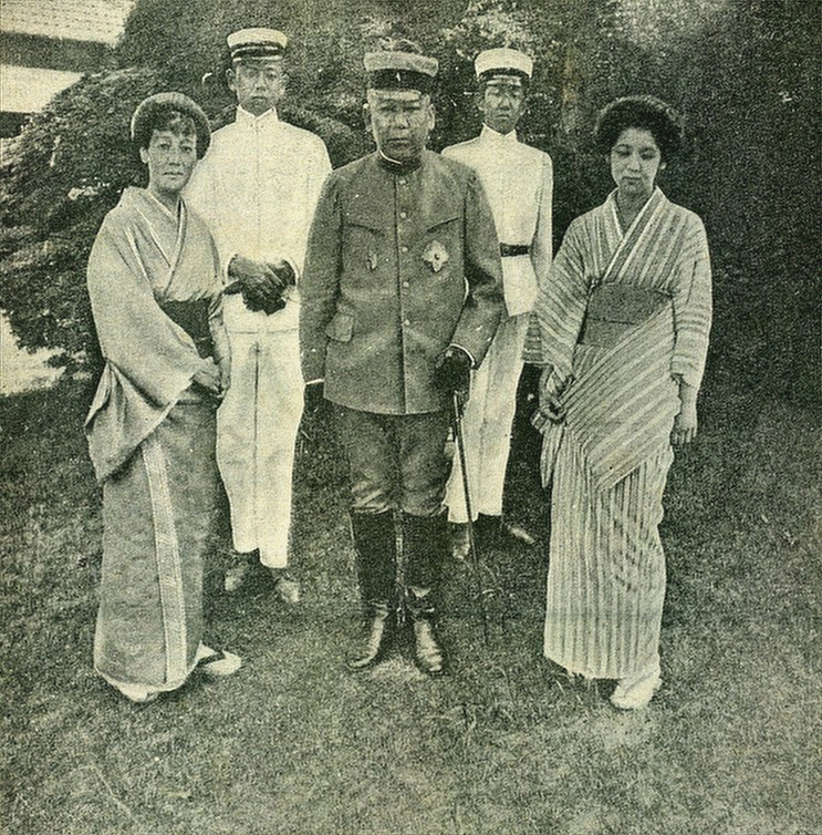 Le Maréchal Oyama , généralissime des armées du Japon et sa famille le fils aîné le fils cadet la marquise Oyama , épouse du Maréchal , le Maréchal , la comtesse Oyama , fille